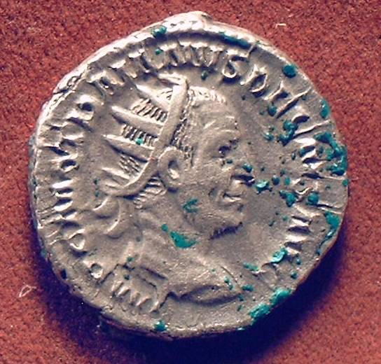 Trajano Decio Antoninian of Trajanus Decius Roman Emeror Trajanus Decius